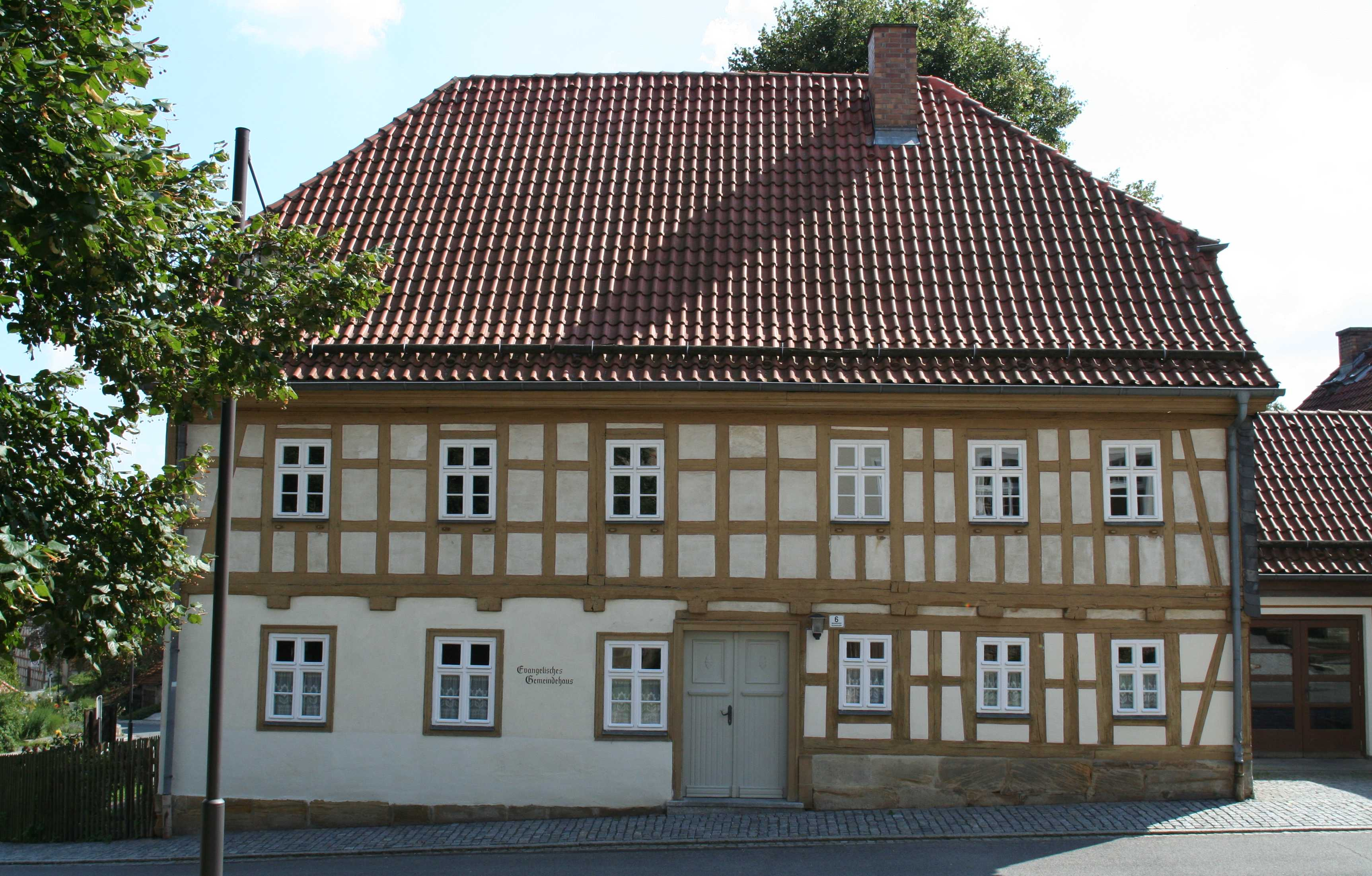 Evang.-Luth. Gemeindehaus Großgarnstadt, Ortsteil von Ebersdorf b.Coburg im Landkreis Coburg in Bayern